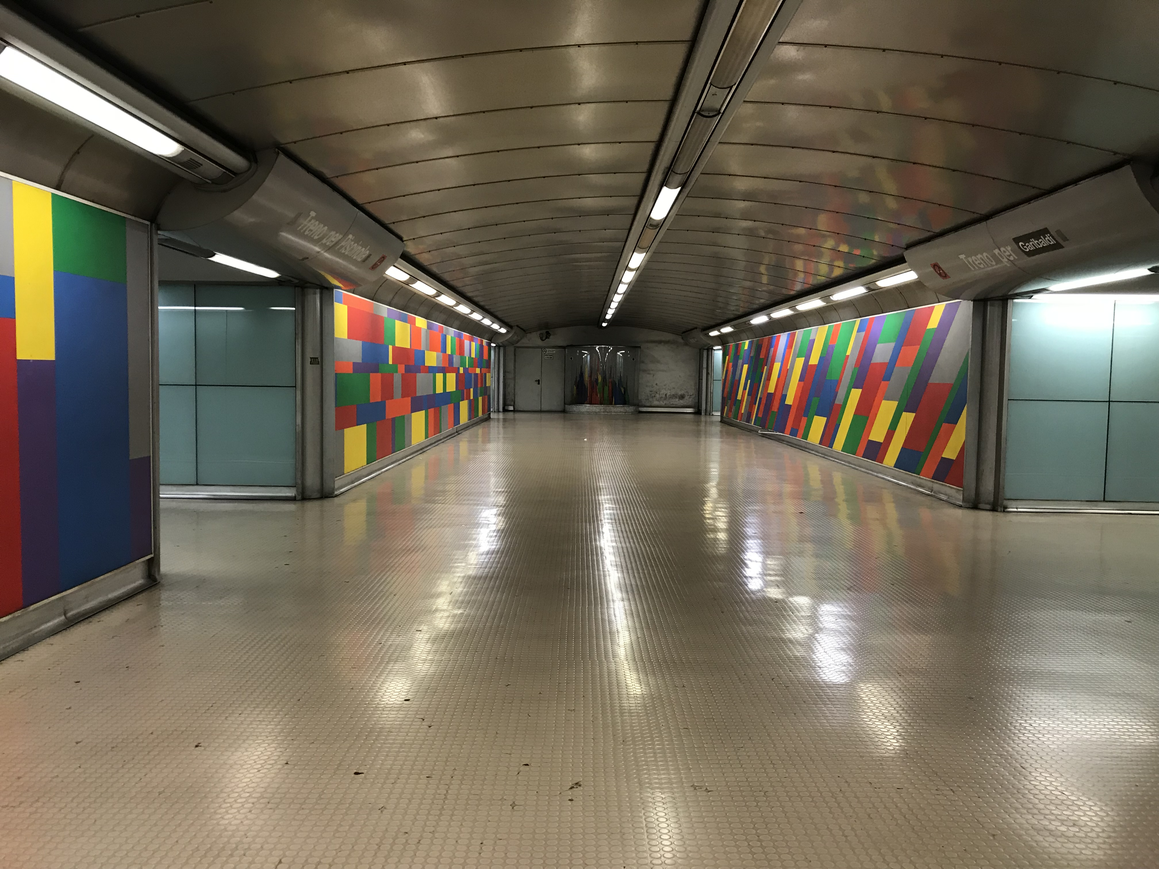 Corridoio divisorio tra le due banchine